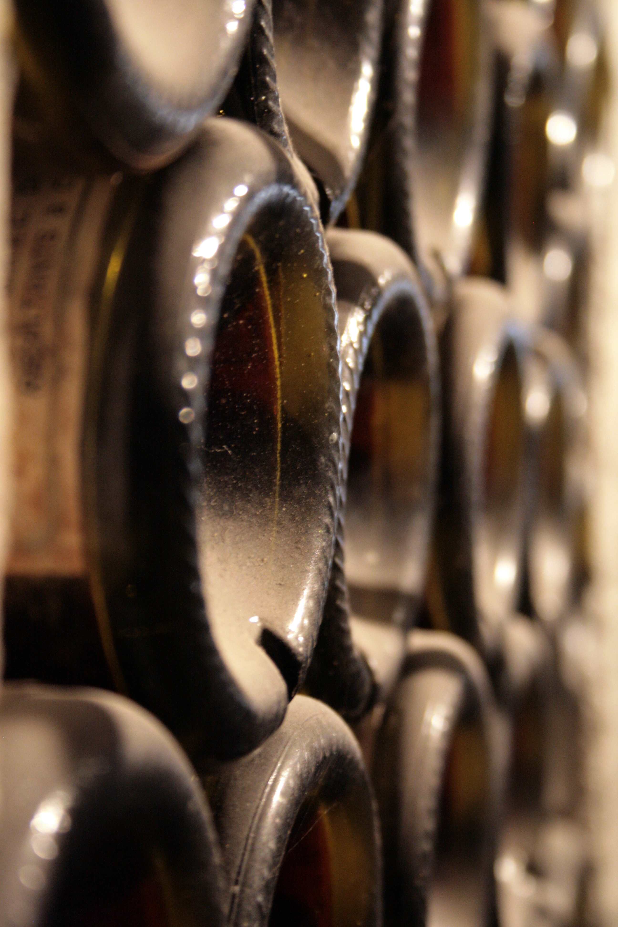 Des caves avec les meilleurs crus du monde.